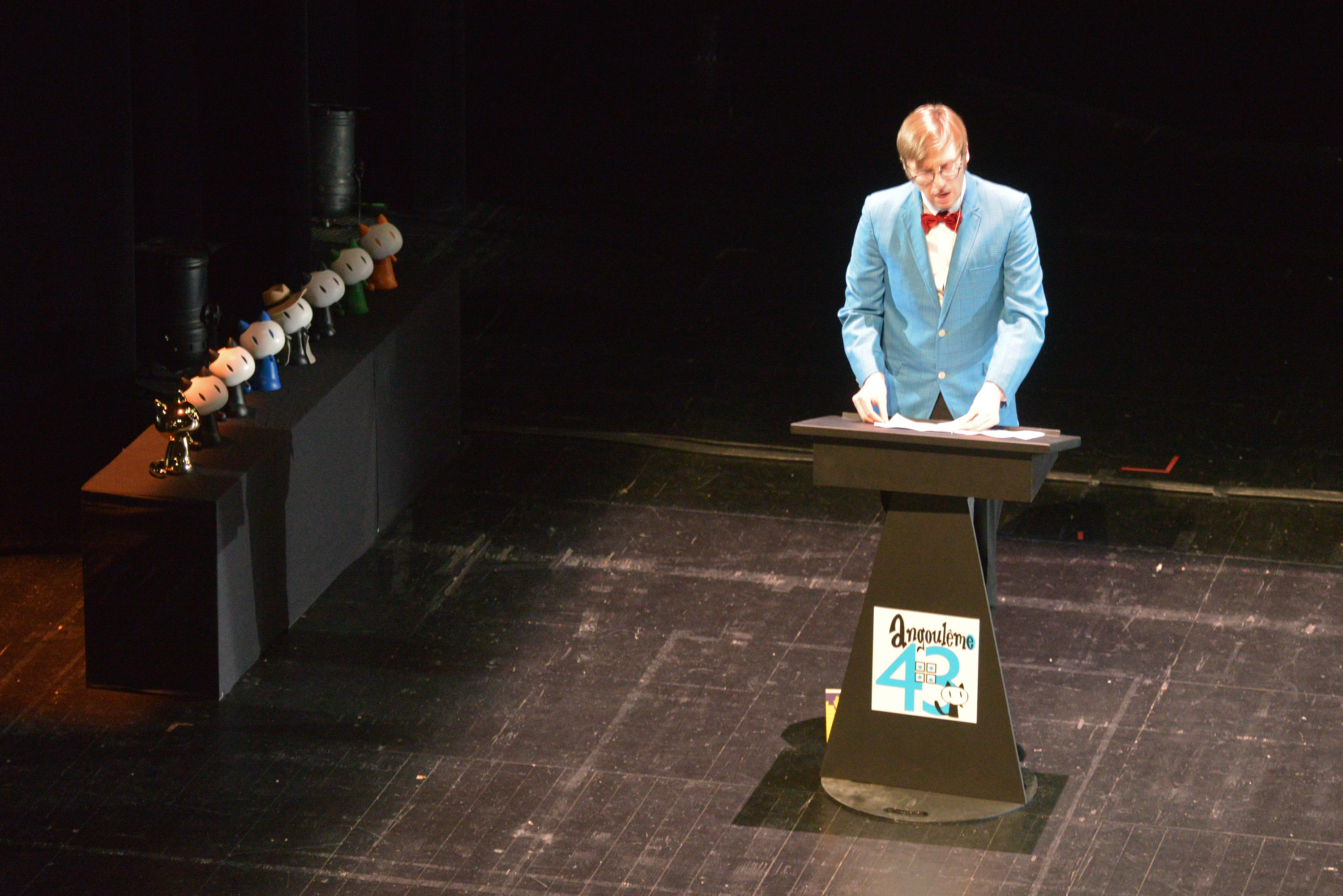 Richard Gaitet présentant la cérémonie de remise des prix, Festival International de la Bande Dessinée d'Angoulême 2016.